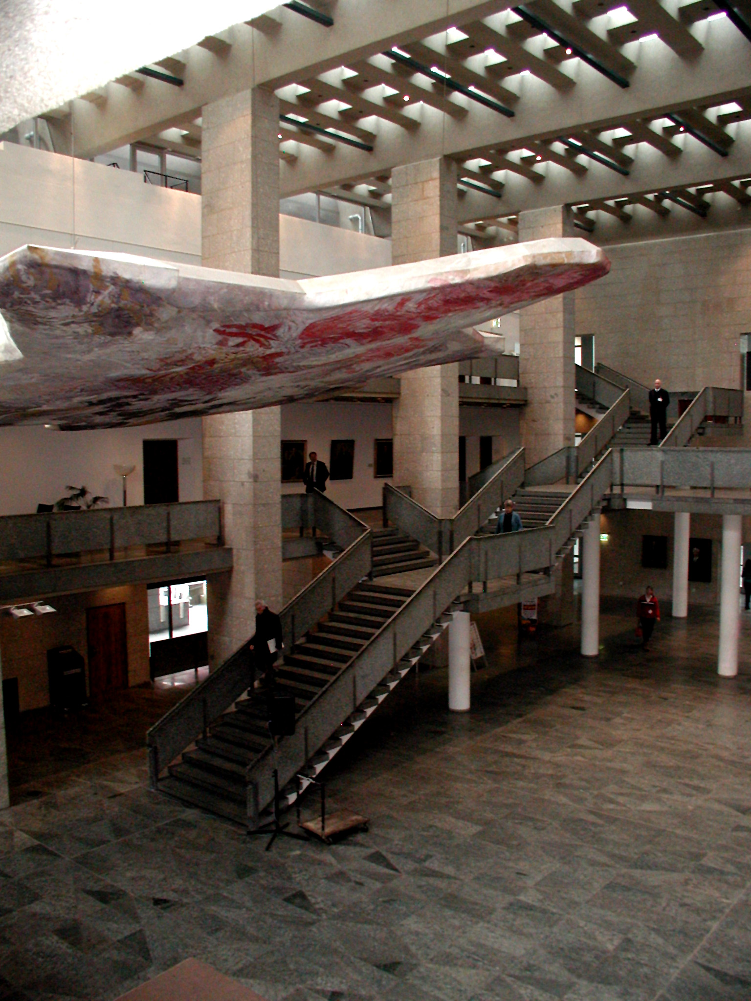 Kölner Rathaus, Piazzetta im Erdgeschoss: „Schwebender Baldachin“ von Hann Trier.